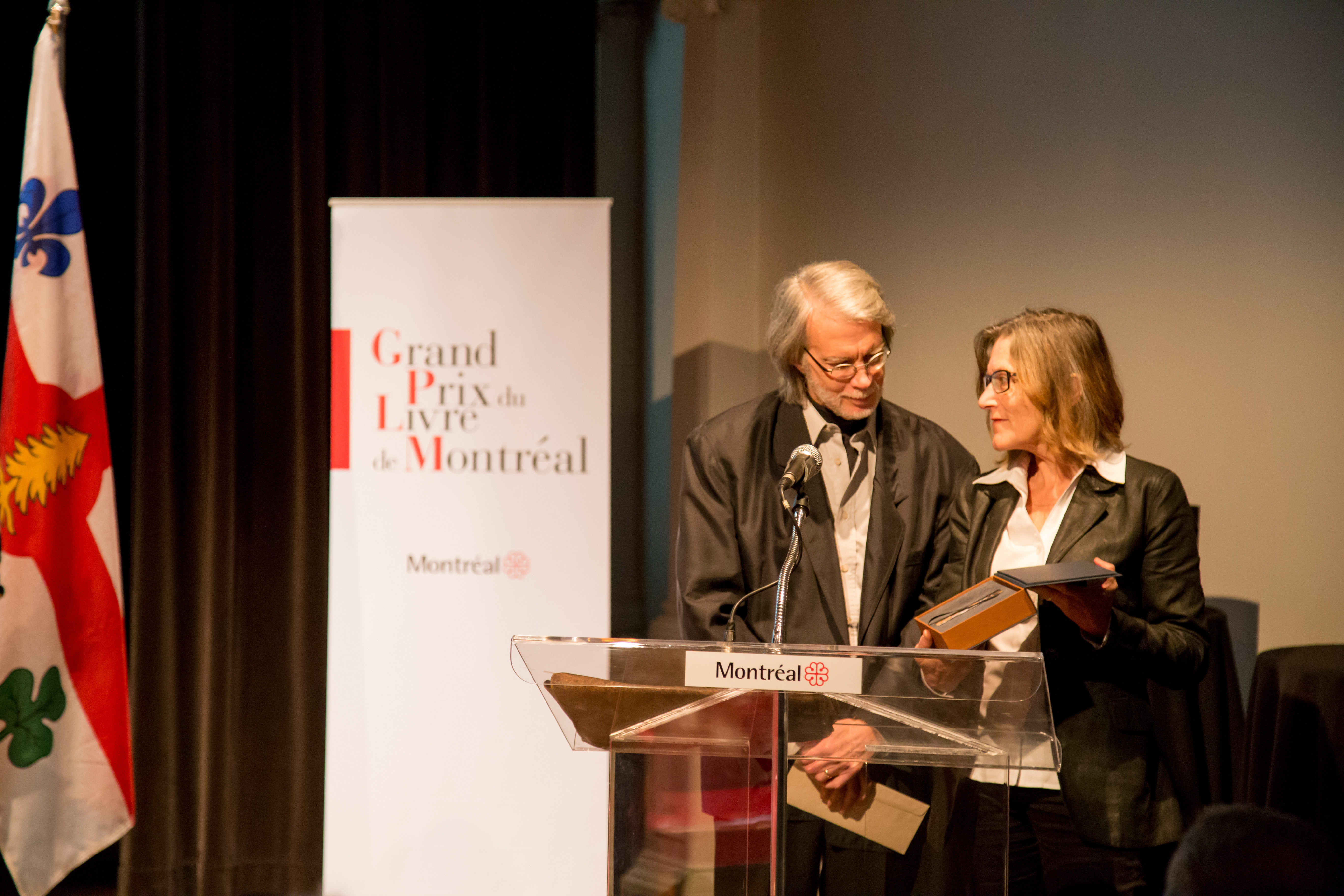 René Lapierre, lauréat du Grand Prix du livre de Montréal 2017 en compagnie de Suzanne Laverdière, directrice du Service de la culture de la Ville de Montréal. Photo prise lors de la cérémonie de l'annonce du lauréat à la Chapelle historique du Bon-Pasteur, 100, rue Sherbrooke Est à Montréal.